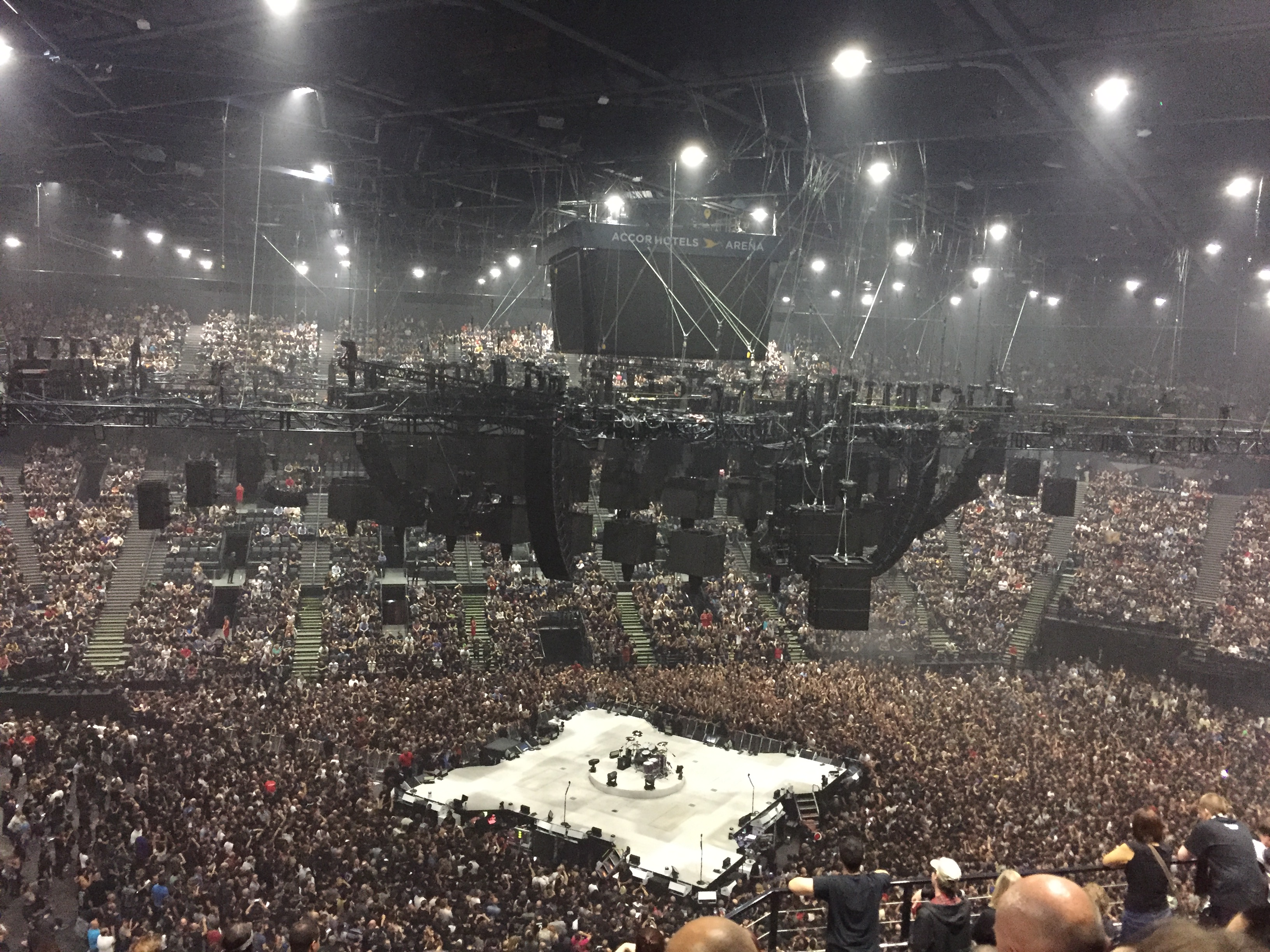 Metallica à l'accor hotel arena le 10 septembre 2017